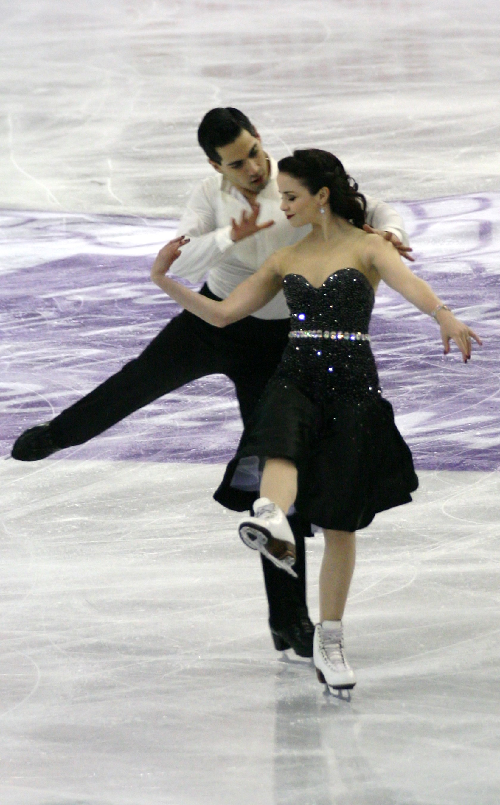 Анна Каппеллини и Лука Ланотте (Италия) на финале Гран-при по фигурному катанию 2015-2016.